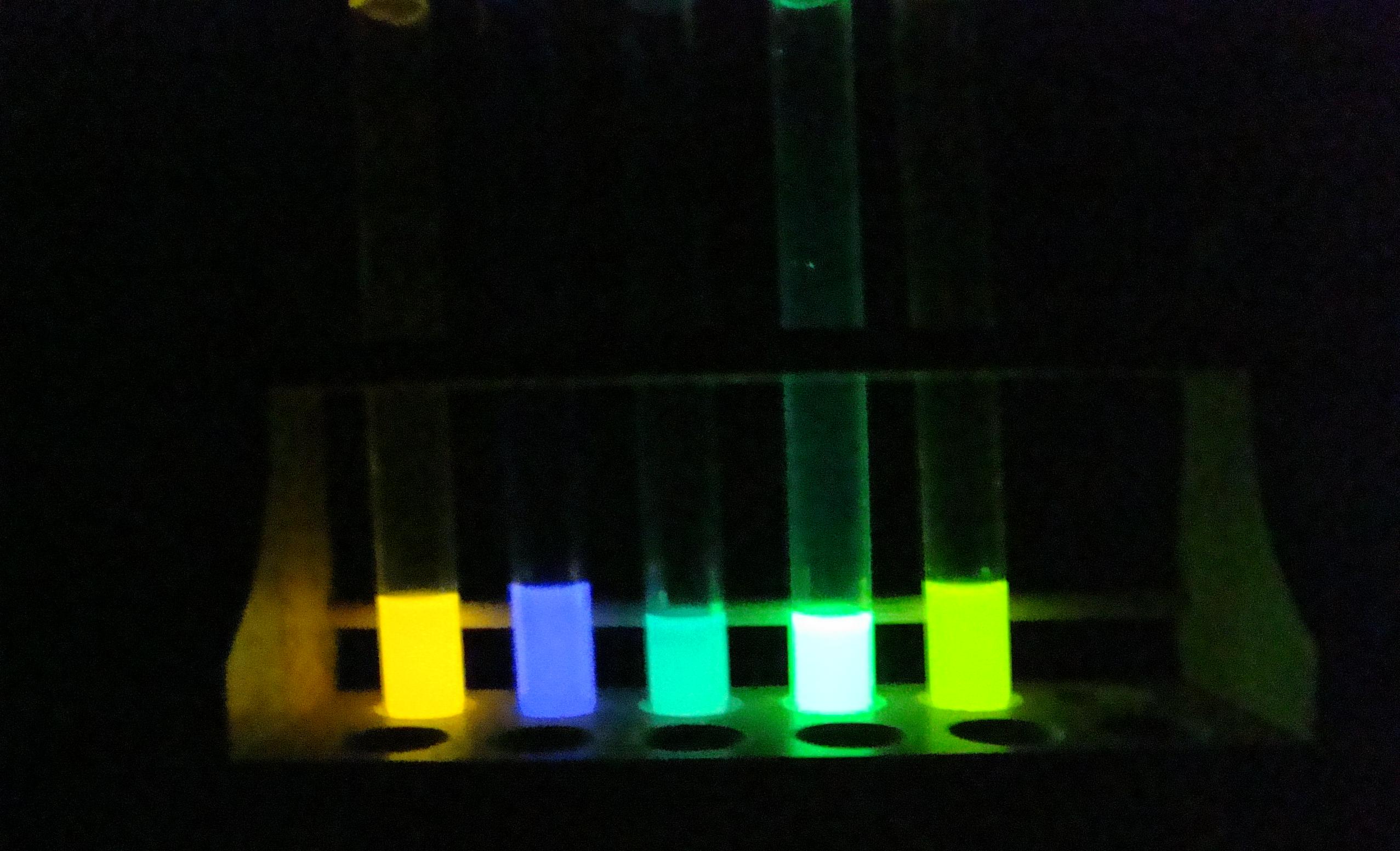 Chemolumineszenz von TCPO (Bis-(2,4,6-trichlorphenyl)-oxalat). Fluorophore (von links nach rechts): Rubren - DPA - BPEA - Cl-BPEA - di-Cl-BPEA . Versuch wurde mit dem Lösungsmittel Ethylacetat, einer 30%igen Wasserstoffperoxid-Lösung sowie dem schwach basischen Katalysator Natriumsalicylat durchgeführt. Menge an TCPO pro Reagenzglas: 0,08g.